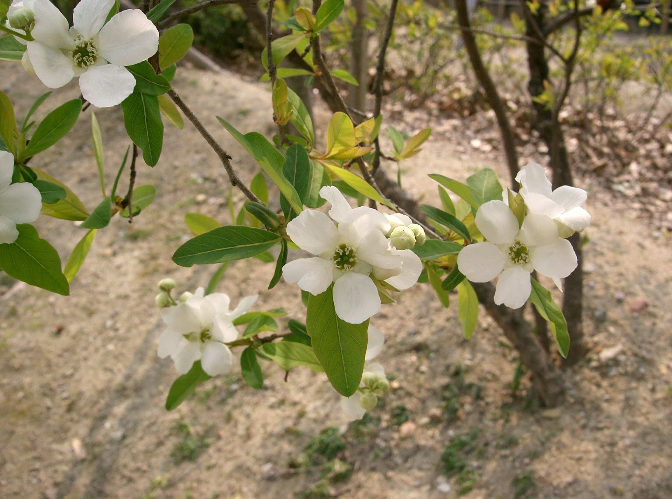 Exochorda racemosa